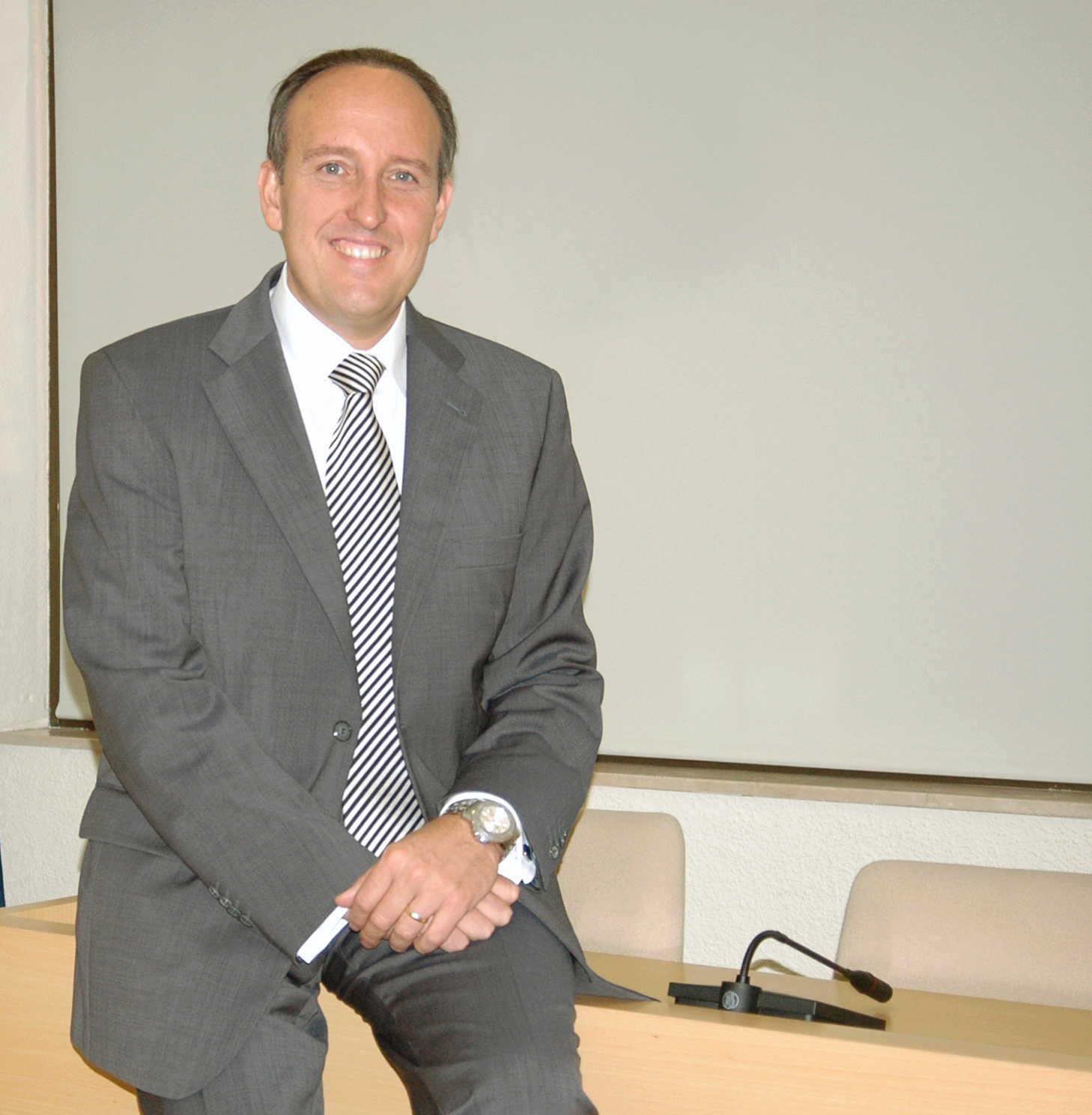 Vicente Ibor en el despacho de alcaldía de Paiporta